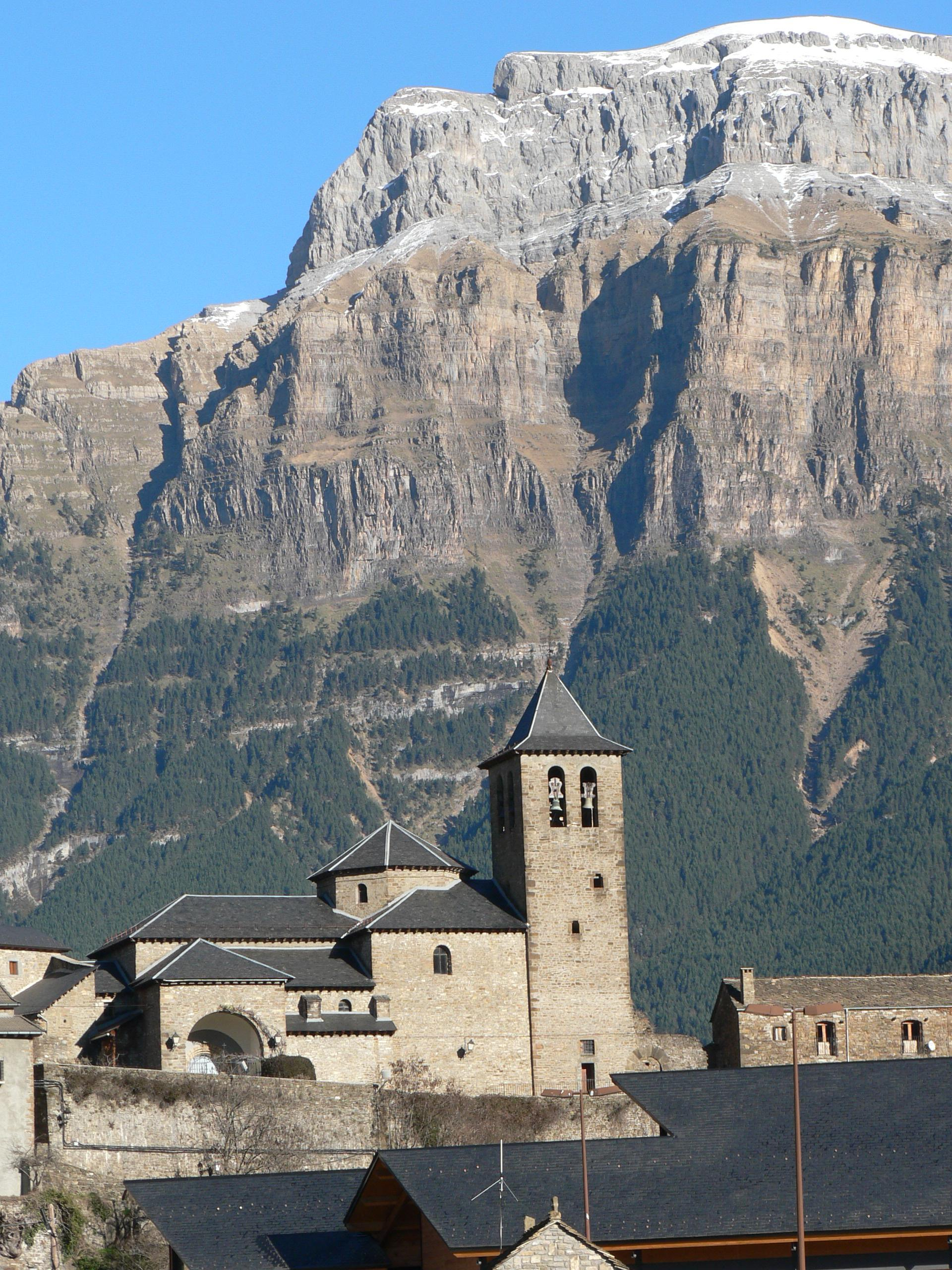 Torla